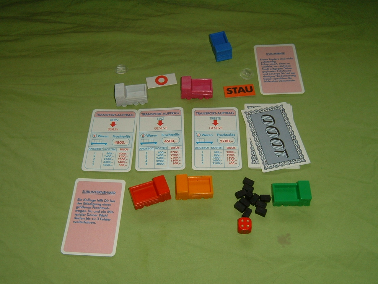 Auswahl von Zubehörteilen des Brettspiels Auf Achse